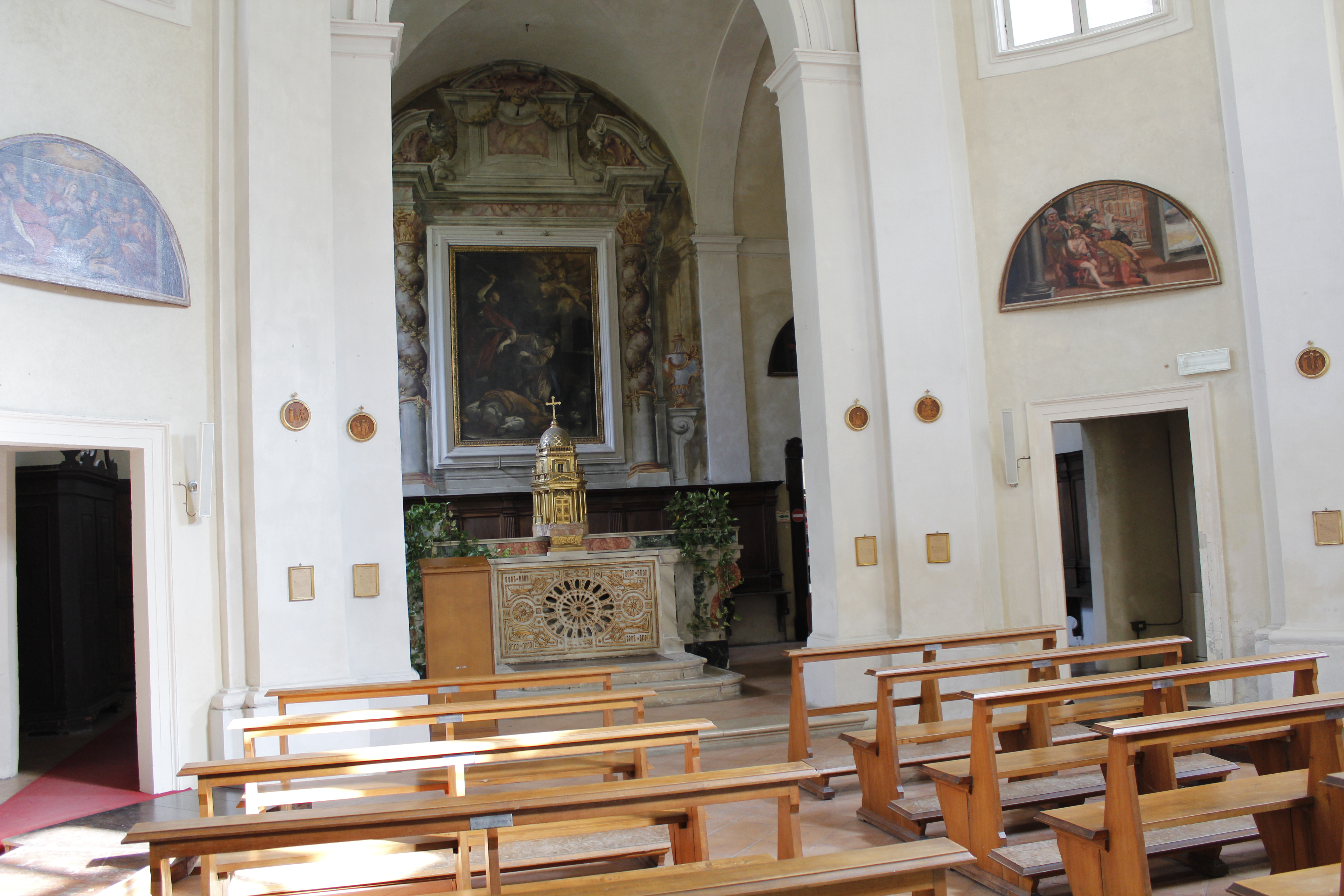 Interno della chiesa Sant'Eufemia, Ravenna